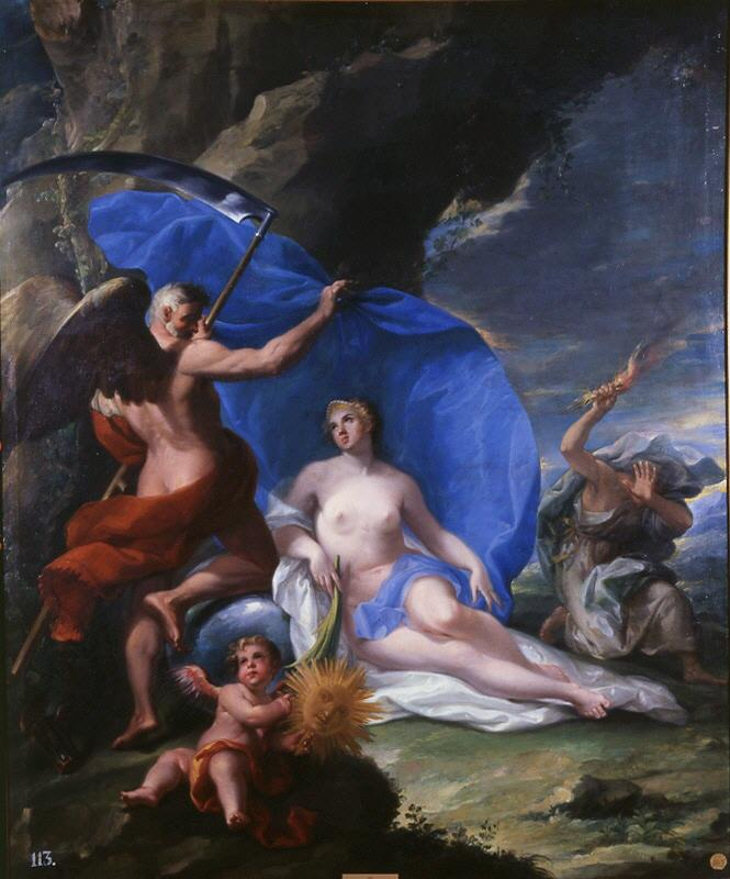 El lienzo, que fue pintado por Andrés de la Calleja en el siglo XVIII, lleva por nombre El Tiempo descubriendo la Verdad.